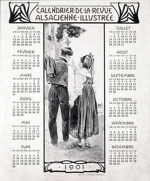 Calendrier de la revue alsacienne illustrée 1901. Bibliothèque nationale et universitaire de Strasbourg